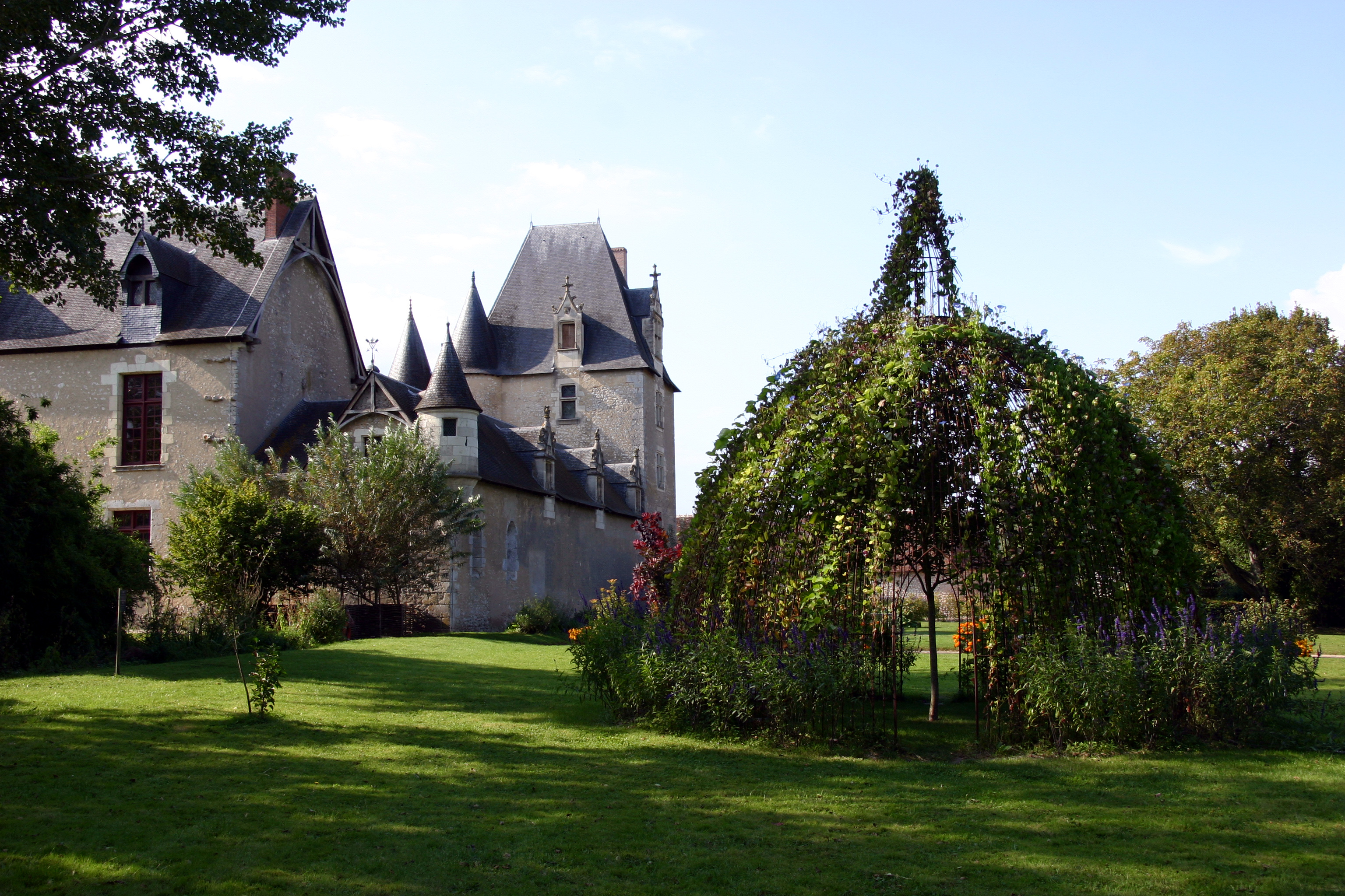 Schloss Fougères-sur-Bièvre